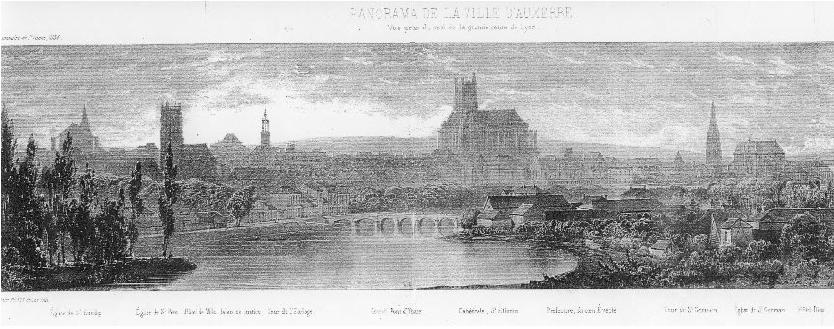 La ville d’Auxerre vue depuis le sud-est